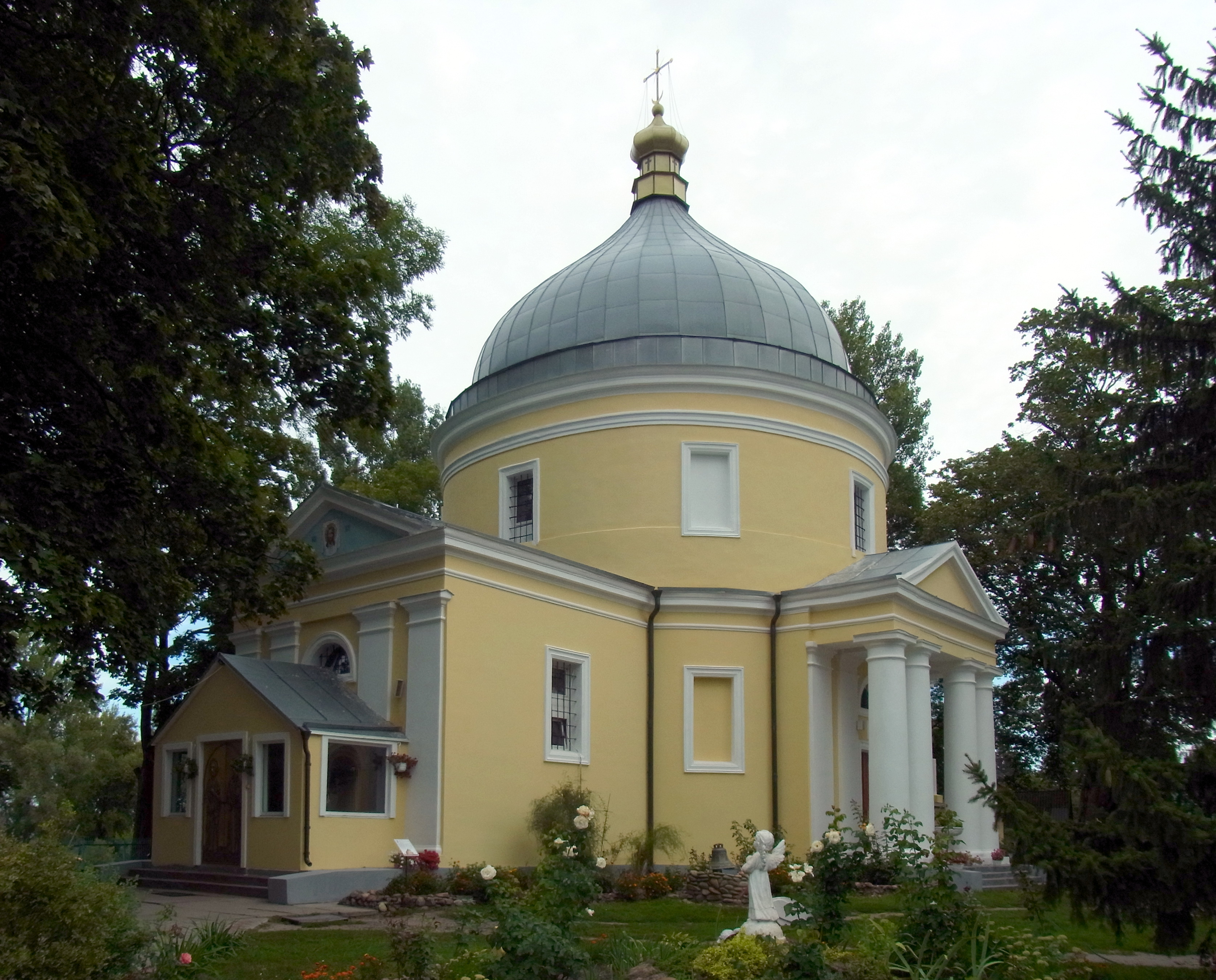 Церква Святих Петра і Павла (мур.) (1846 рік) - вигляд з південного заходу - Світязь Шацький район Волинська область Україна